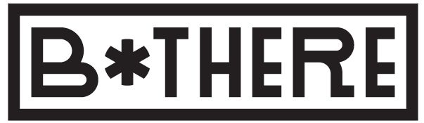 Logo en huisstijl zijn ontwikkeld door Studio Turbo en Studio Daad